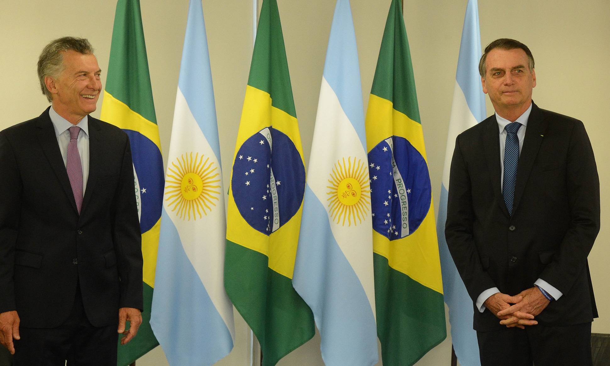 Los presidentes Macri y Bolsonaro coincidieron en fortalecer la cooperación bilateral